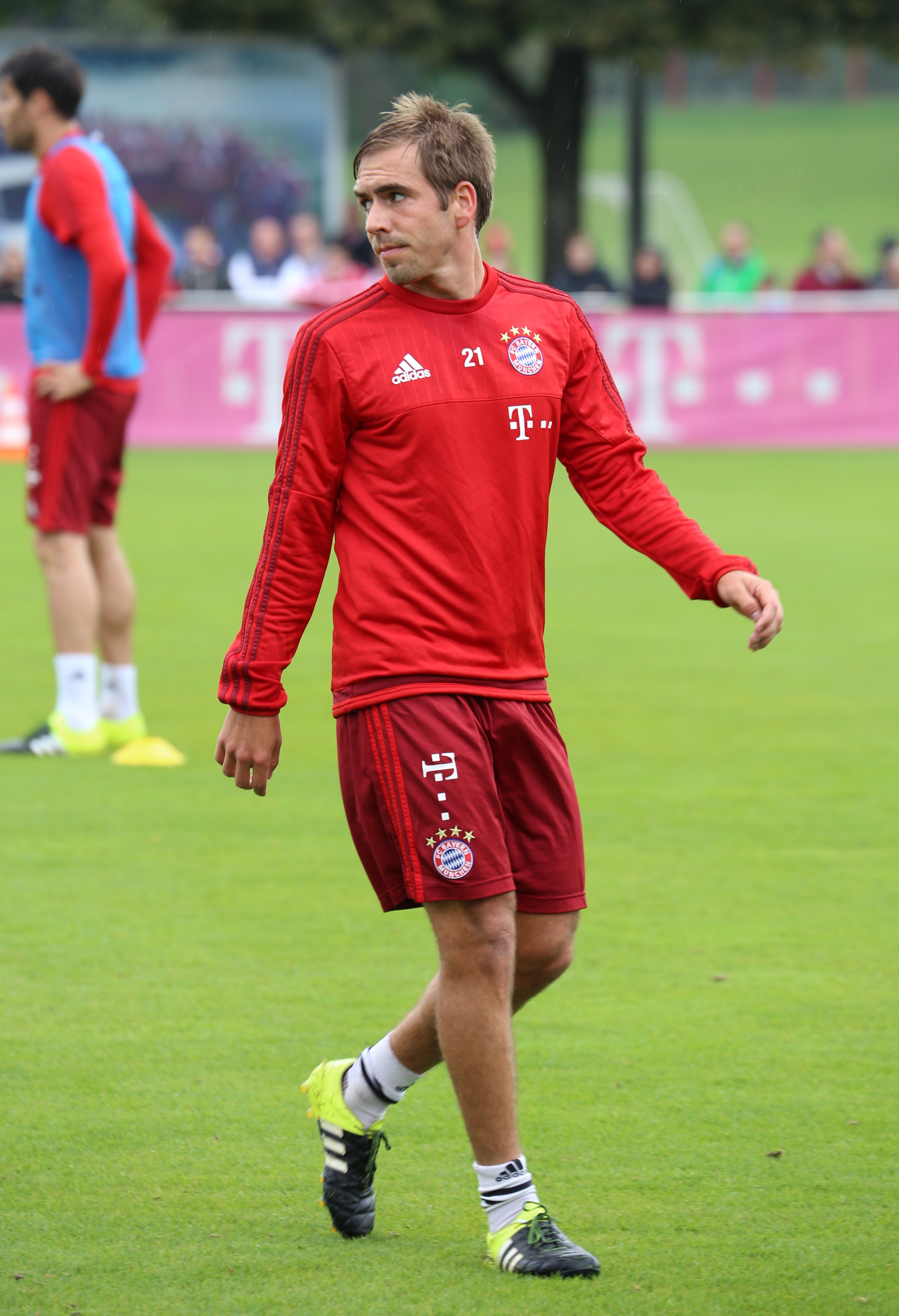 Philipp Lahm beim Training auf dem Gelände des FC Bayern München